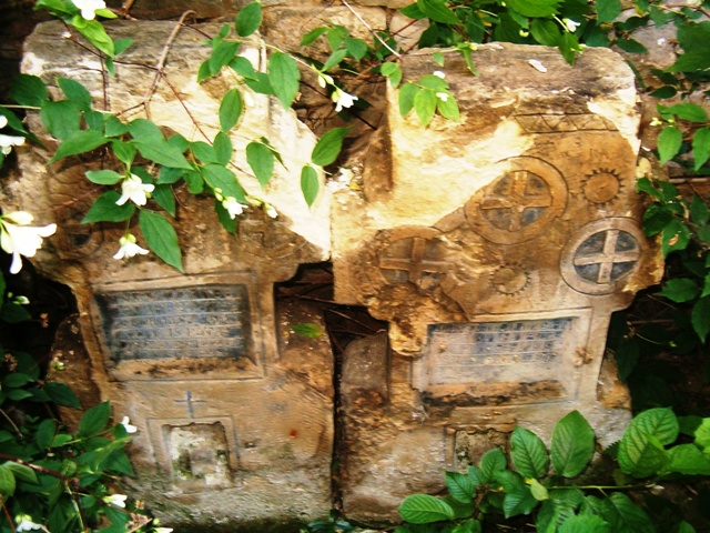 Два символични войнишки надгробни паметника на загинали войници от селото, поставени в двора на църквата на село Конак, община Попово, заедно с много други. Фото: Вл. Стойков - 19.05.2008 год.